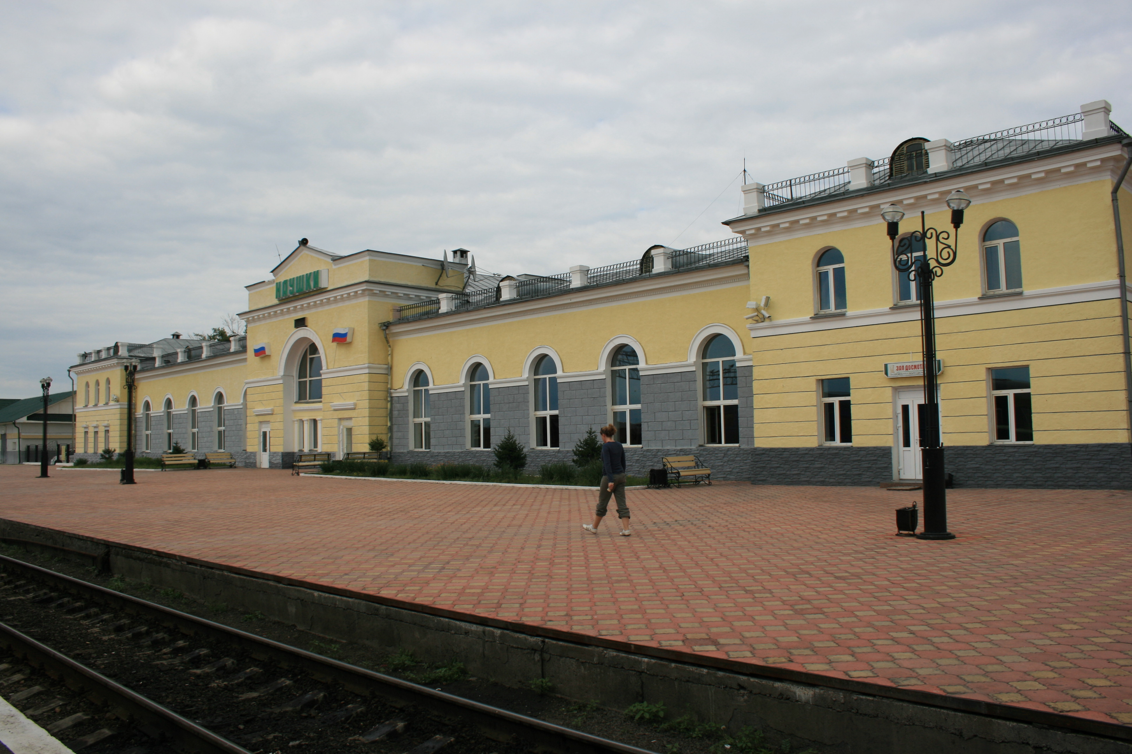 Nádraží Transmongolské magistrály v Nauški v Burjatsku